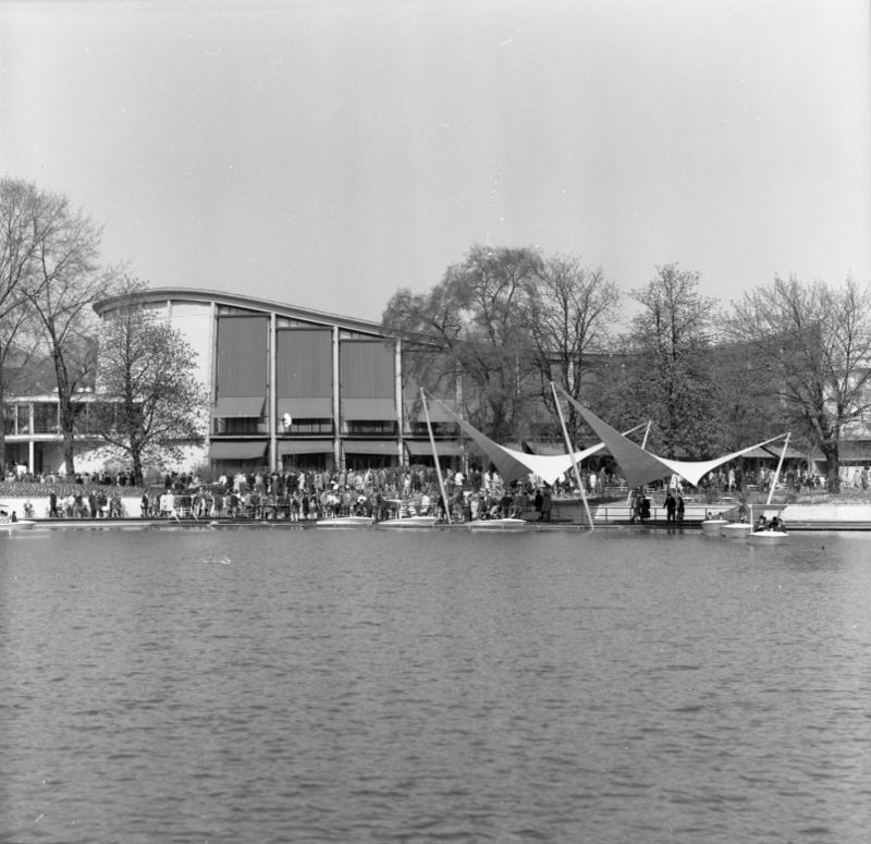 Bundesgartenschau 67 Karlsruhe (See mit Schwarzwaldhalle)